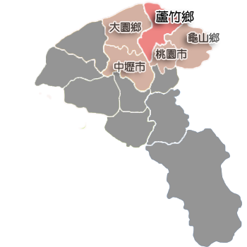 蘆竹鄉行政區劃